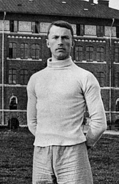 Harald Arbin